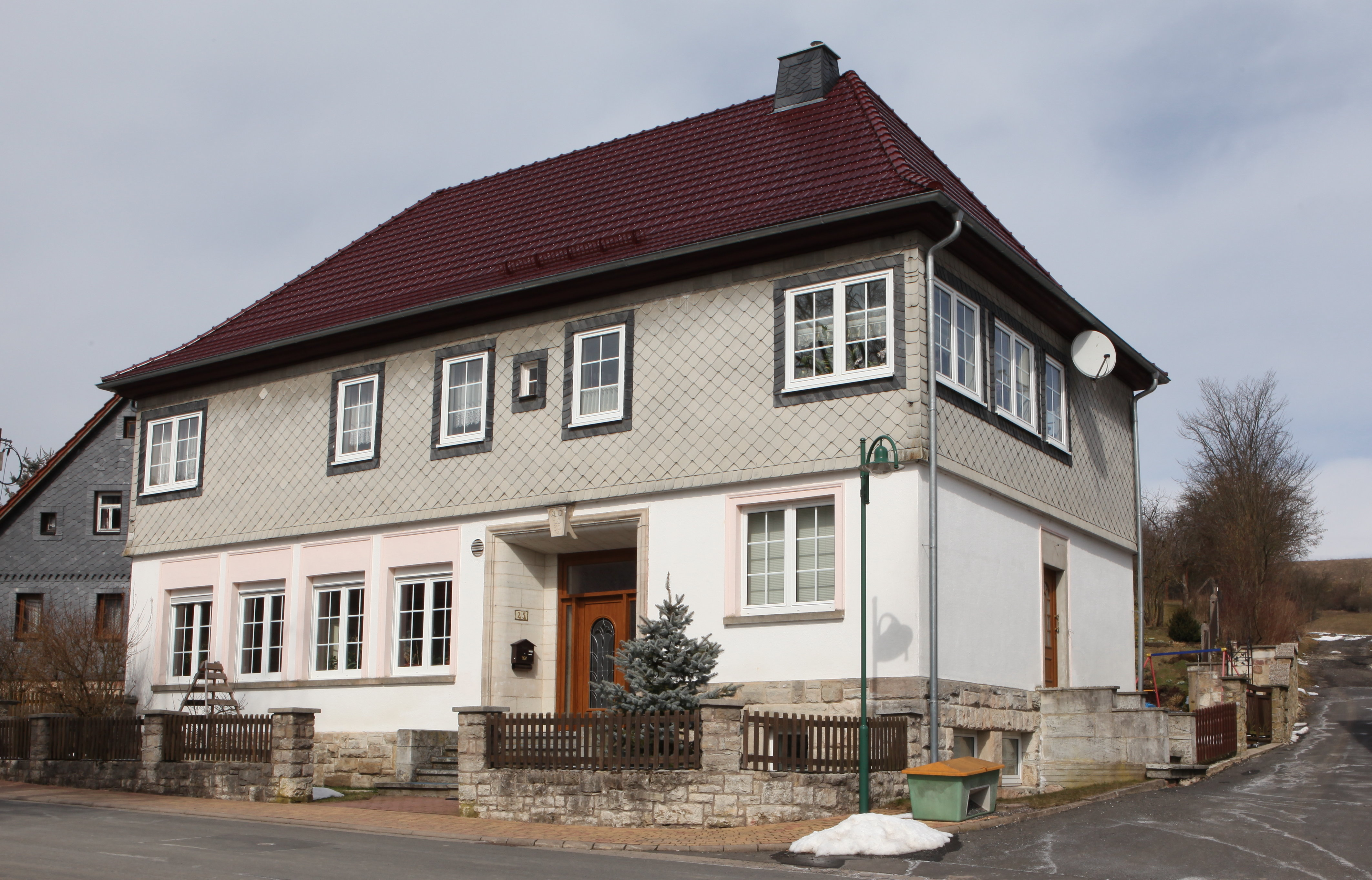 Ehemalige Schule in Poppenwind, OT von Auengrund, Landkreis Hildburghausen